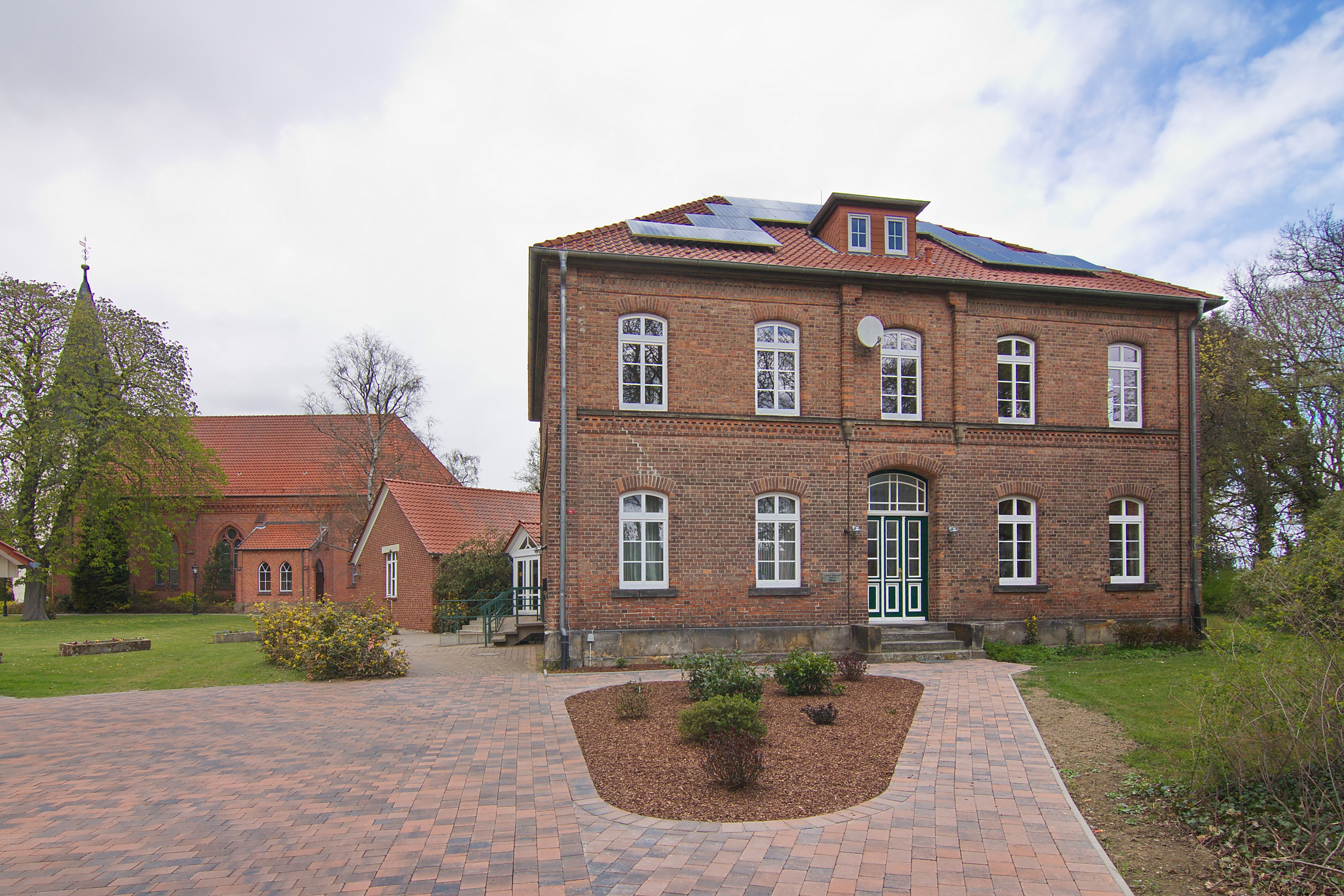 Pfarrhaus in Dungelbeck (Peine), Niedersachsen, Deutschland.